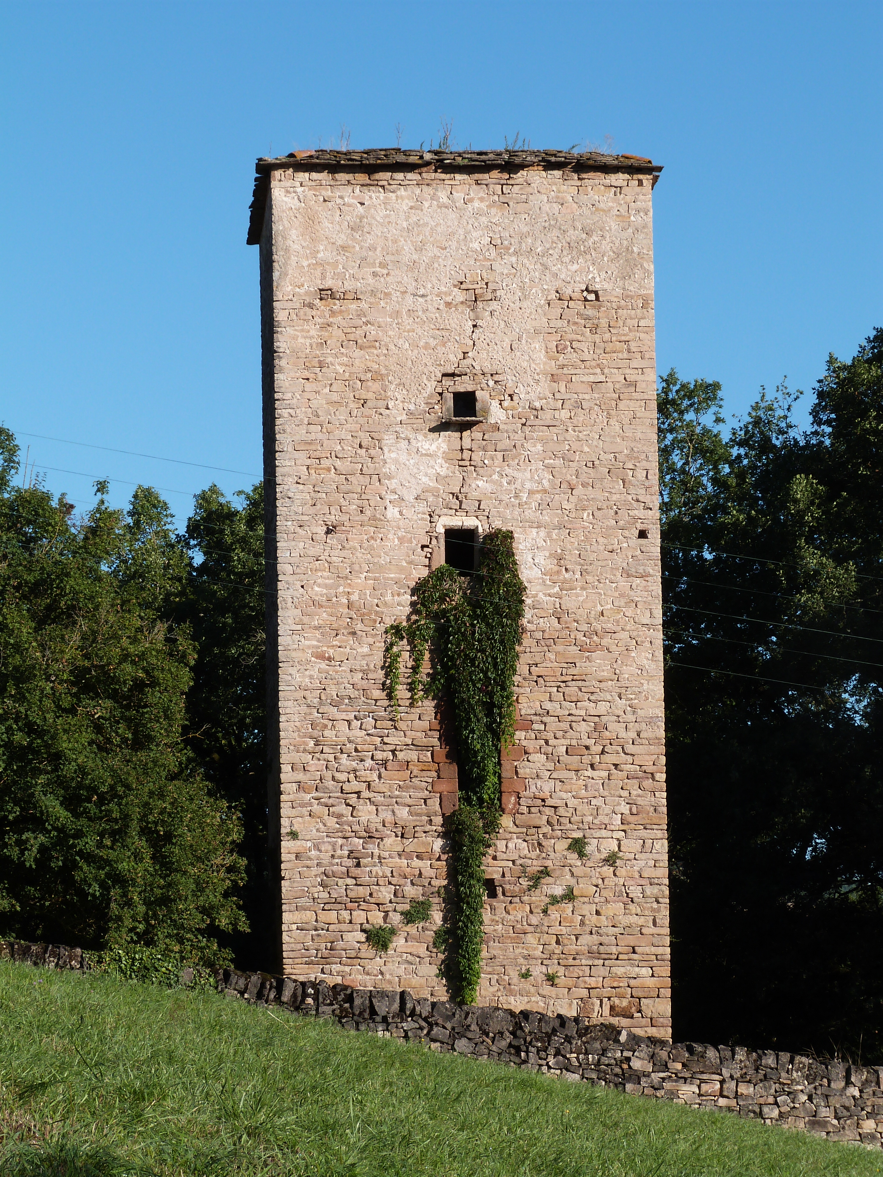 Tour des Cabannes (Inscrit) .